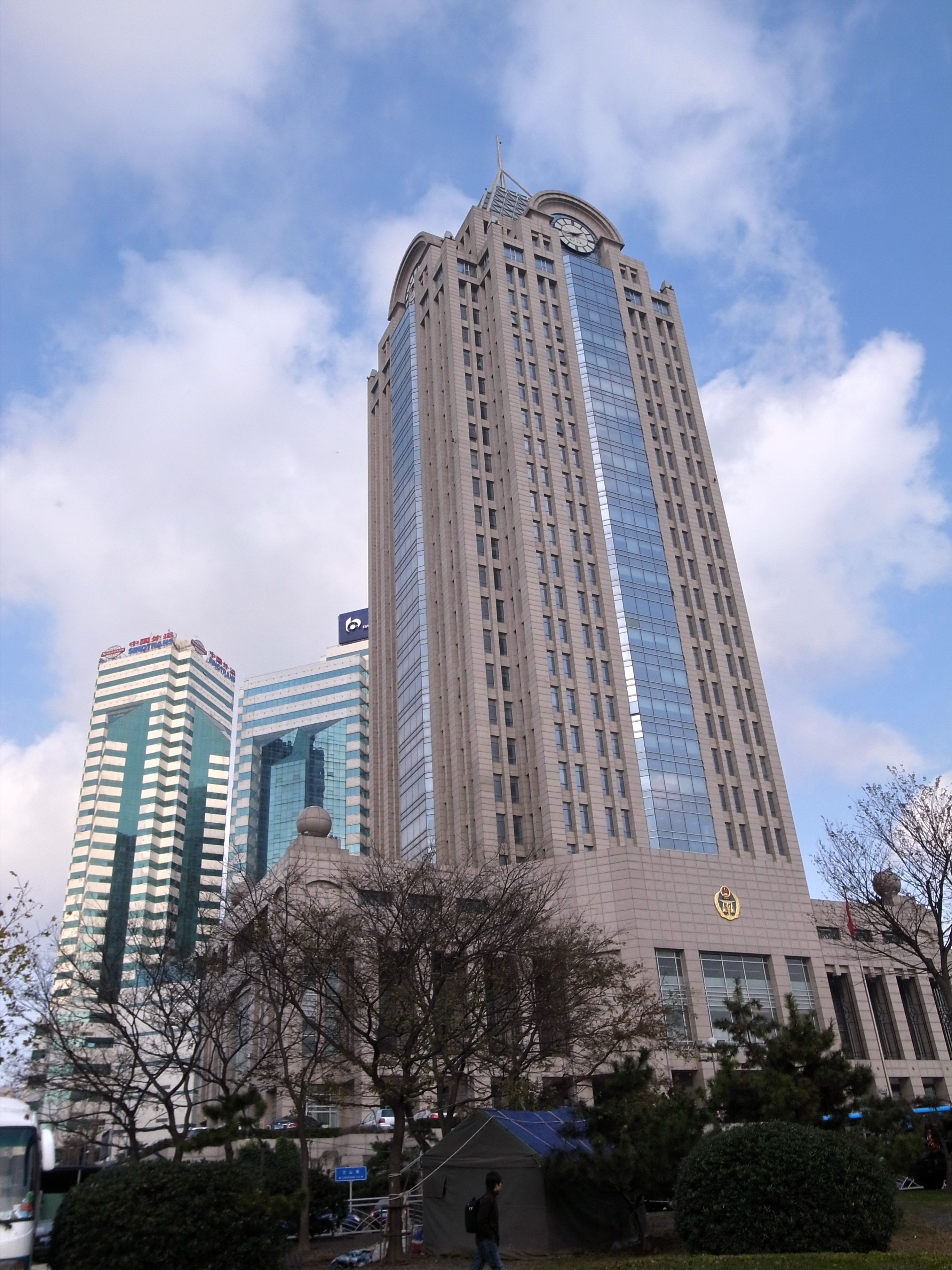 青岛商检局大楼